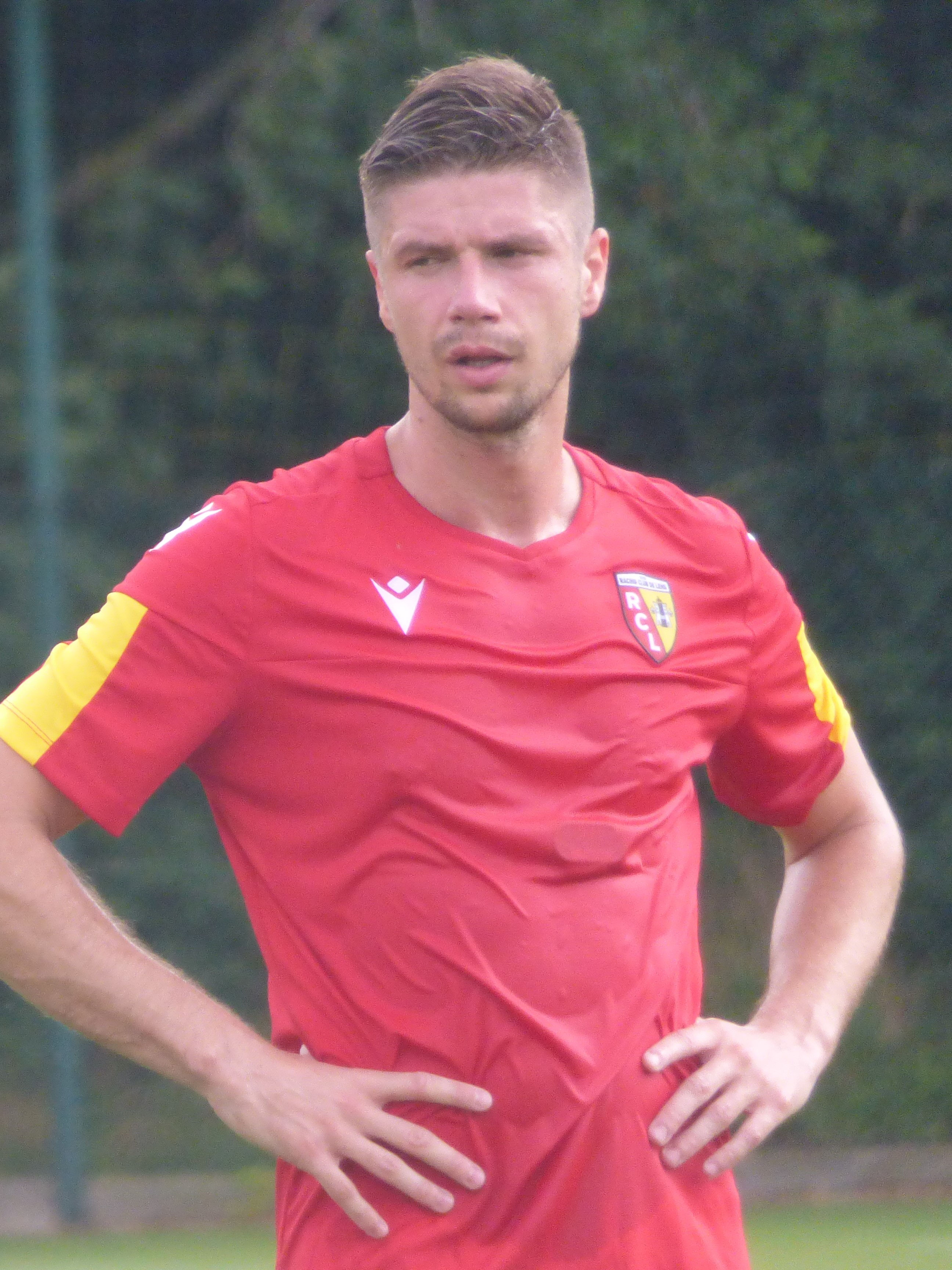 Manuel Perez lors de l'entraînement public du Racing Club de Lens, au centre technique et sportif de La Gaillette le 2 juillet 2019